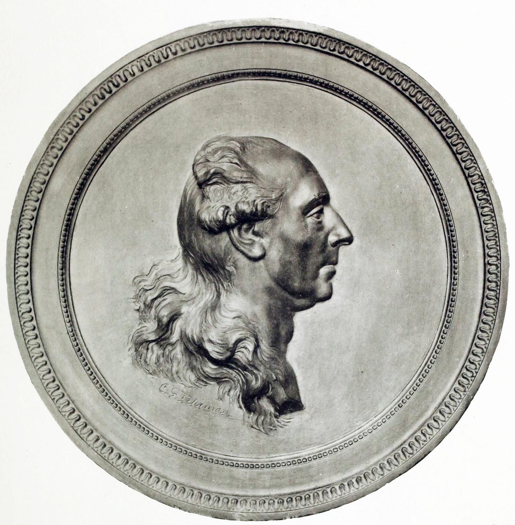 Carl Ribben (1734-1803). Något äldre man, bröstbild profil t. v., med uppstruken peruk i lock vid örat, på halsen nedhängande nackhår, bar hals. Signerad under afskärningen C. G. Fehrman. Gipsmedaljong, 56 cm. i diameter, af Karl Gustaf Fehrman. Medicinalstyrelsen.